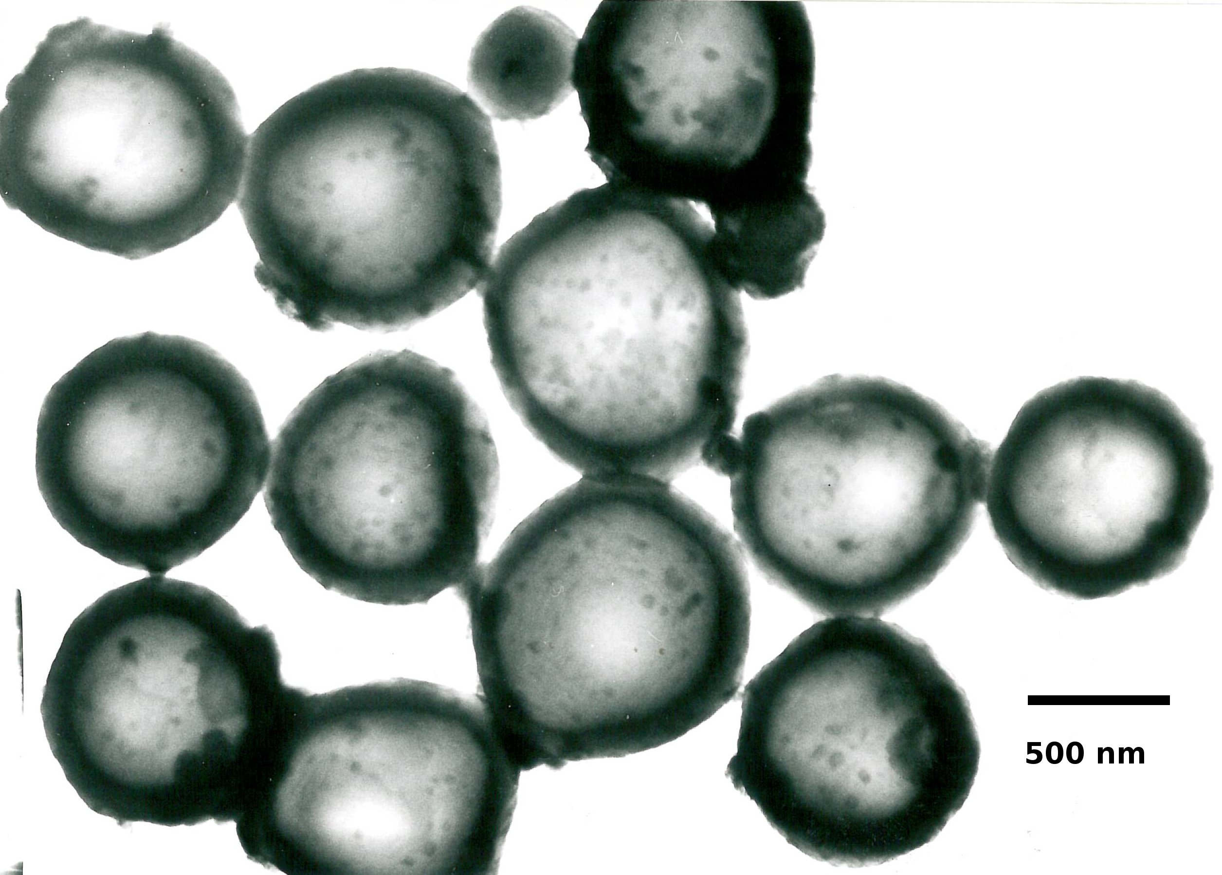 TEM-Aufnahme hohler Latexpartikel, Rutheniumkontrastierung